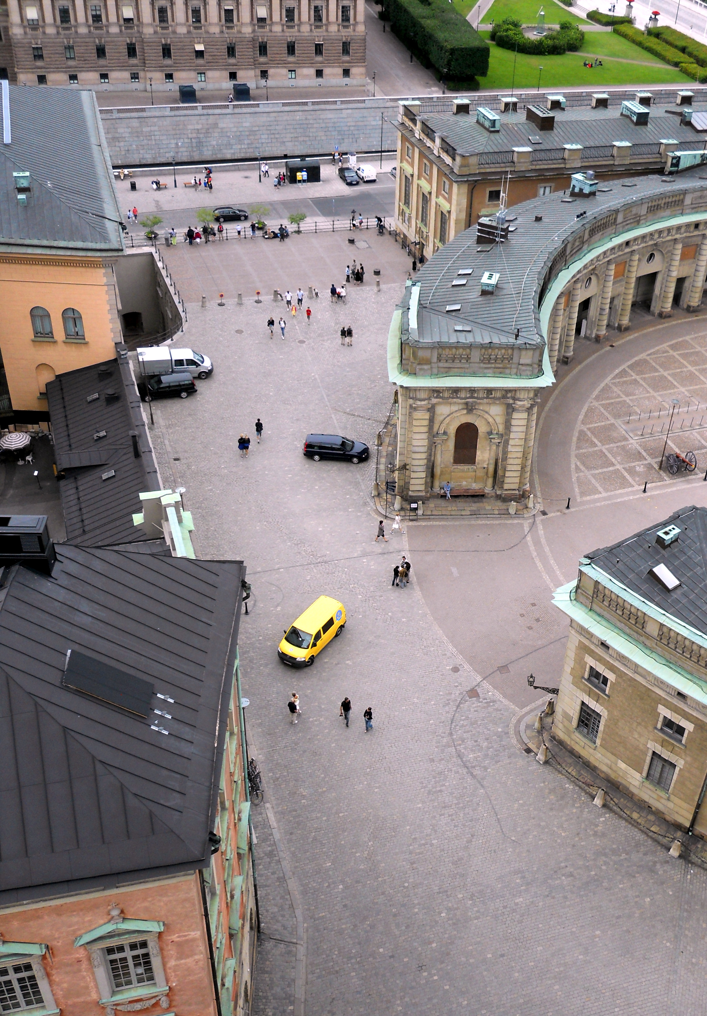 Högvaktsterrassen sedd från Storkyrkans torn.